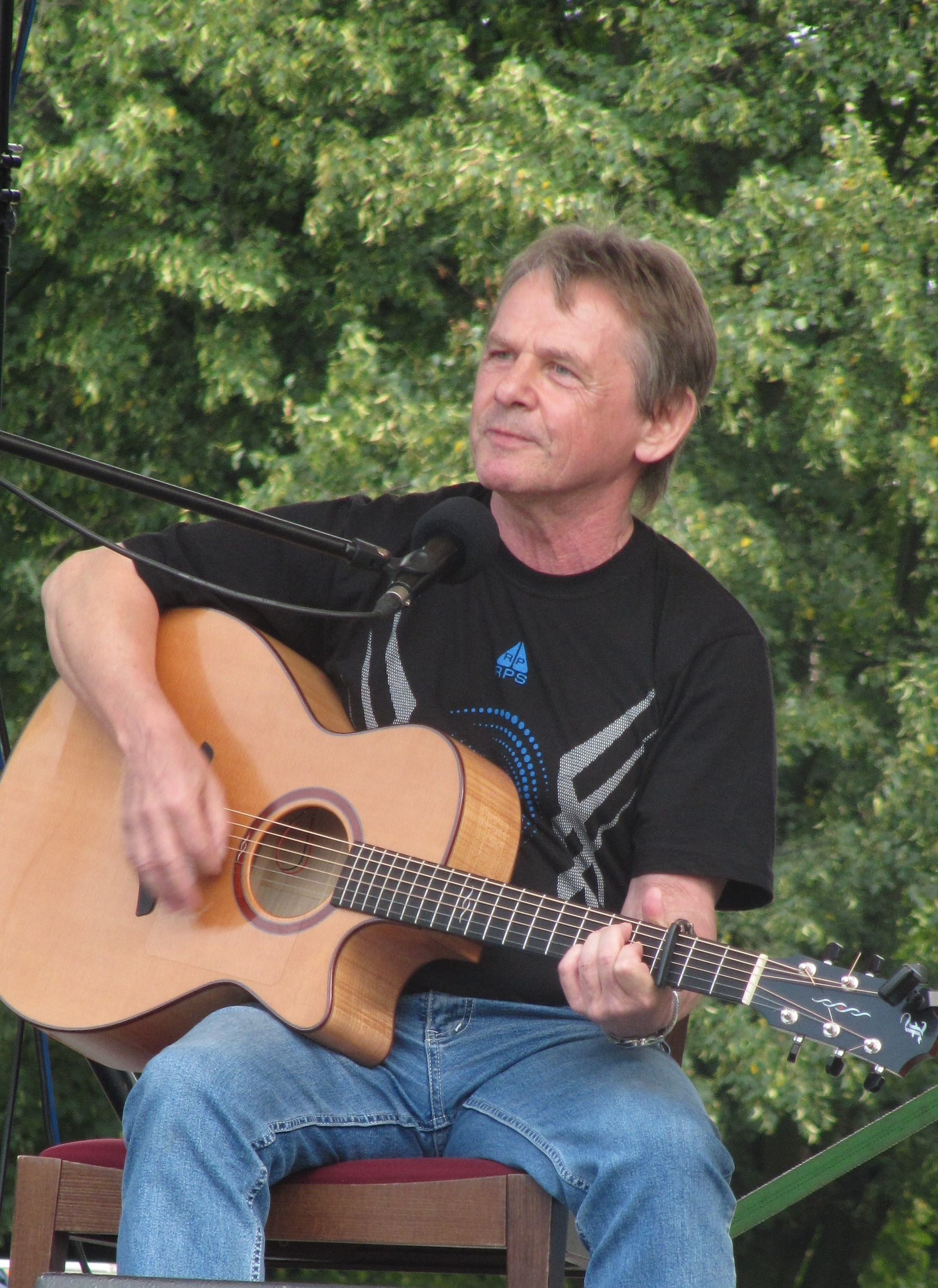 Vojta Kiďák Tomáško na 1. ročníku festivalu Toulavej, Holešov, srpen 2013